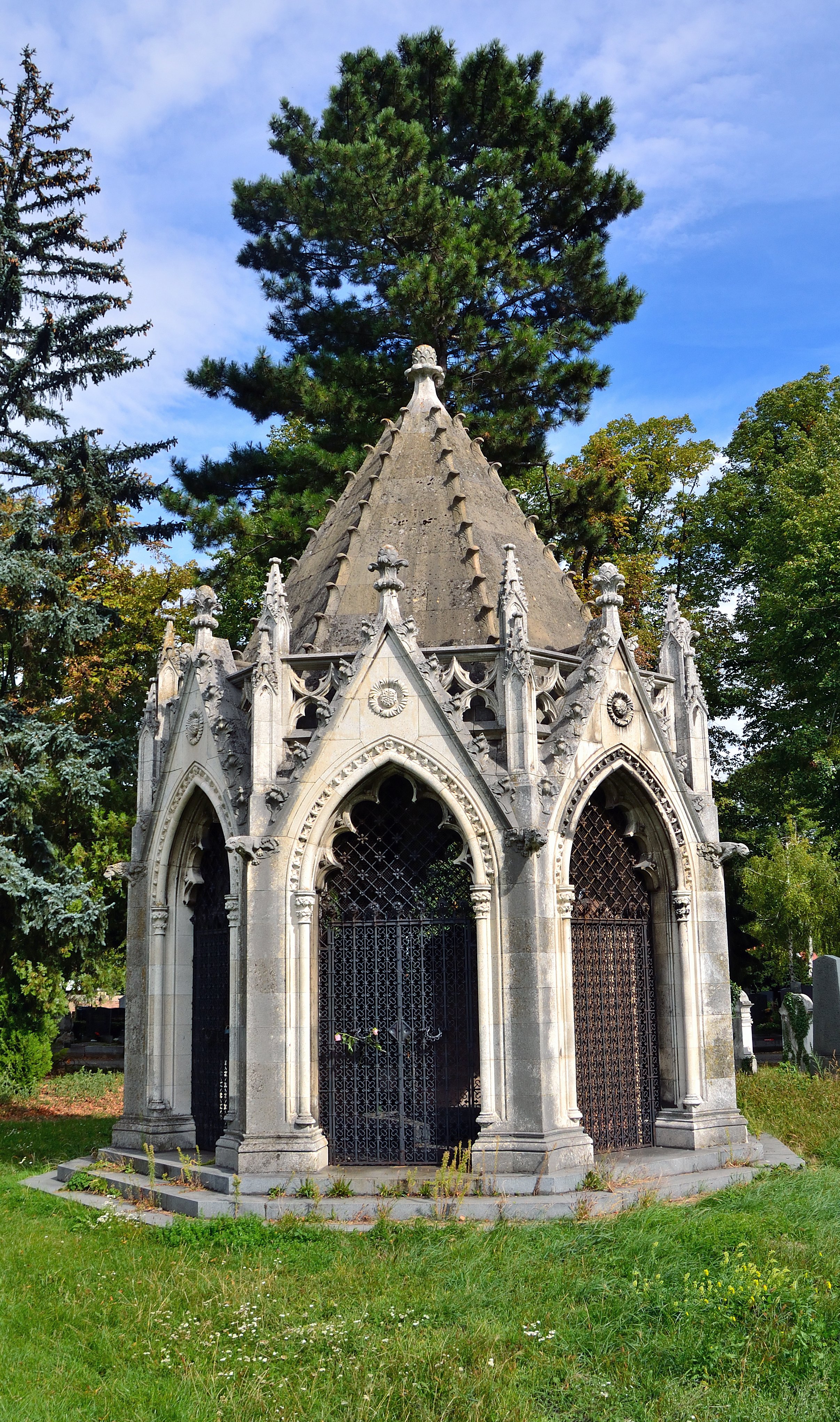 Mausoleen am alten Jüdischen Friedhof Dieses Bild wurde anlässlich des österreichischen Tags des Denkmals 2013 in Wien eingereicht.